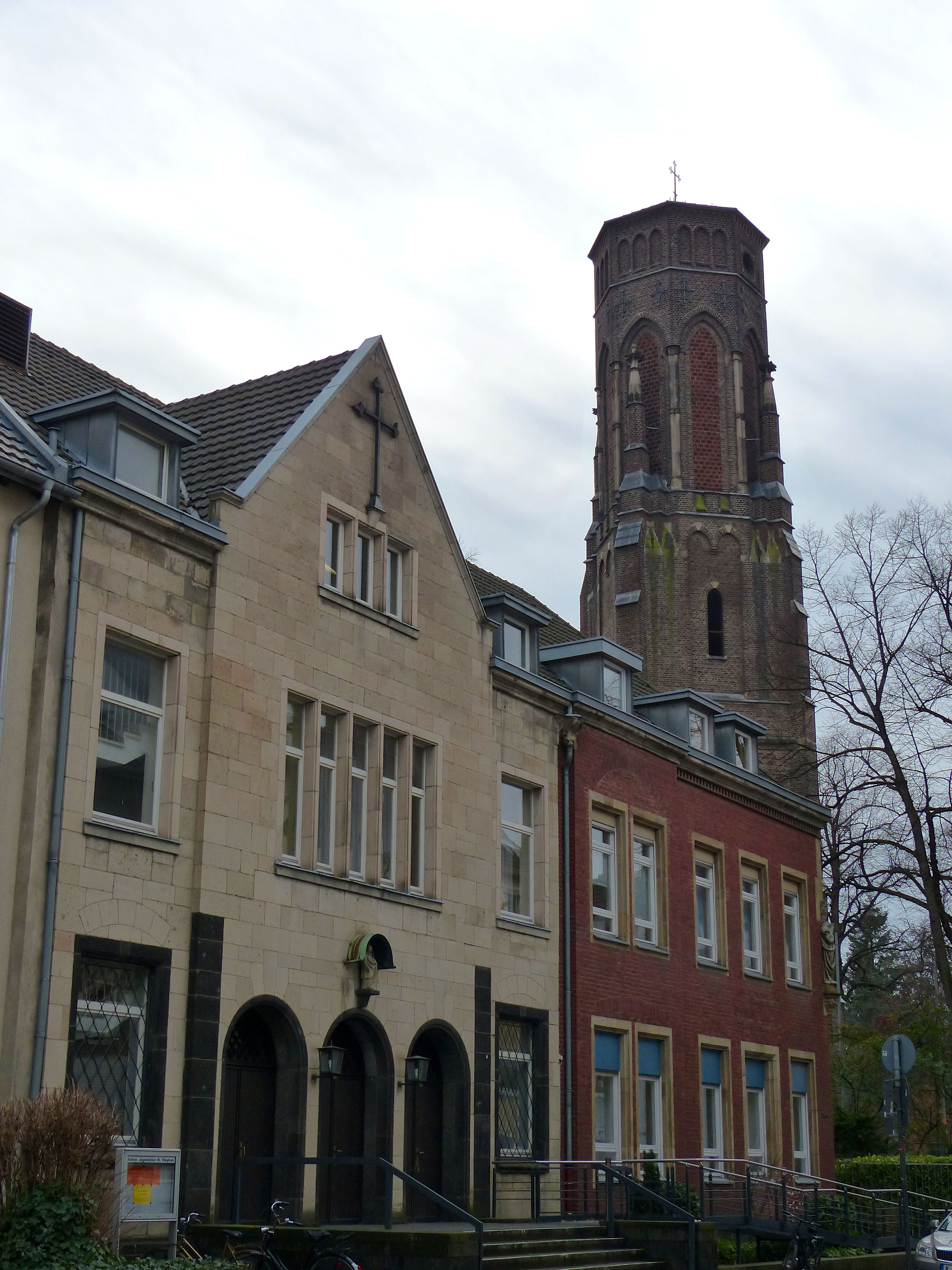 Gemeindehaus der Pfarrkirche St. Stephan in Köln Lindenthal, Bachemer Strasse, Campanile der Kirche St. Stephan im Hintergrund